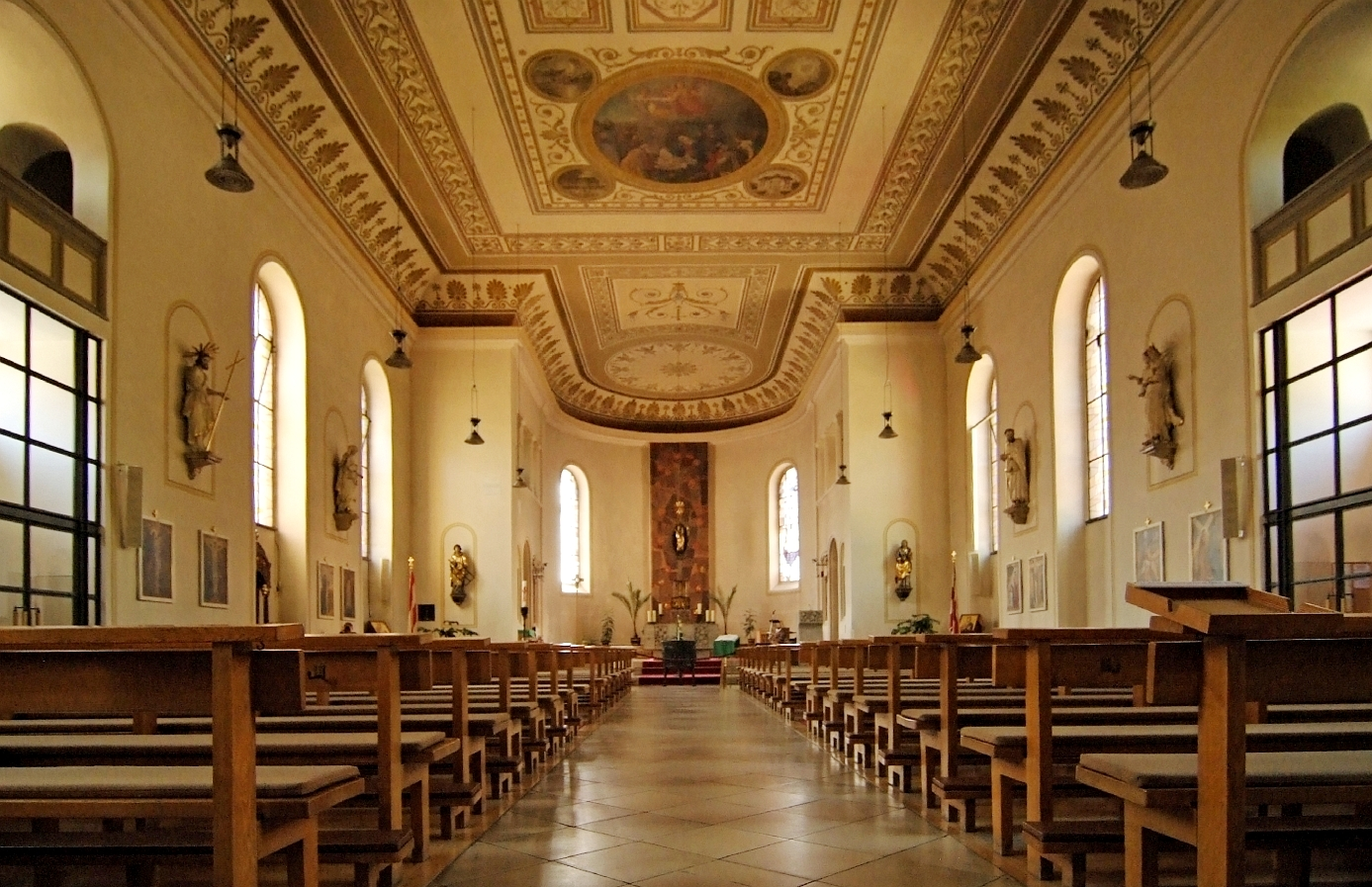 Fürth, Bavaria, Germany